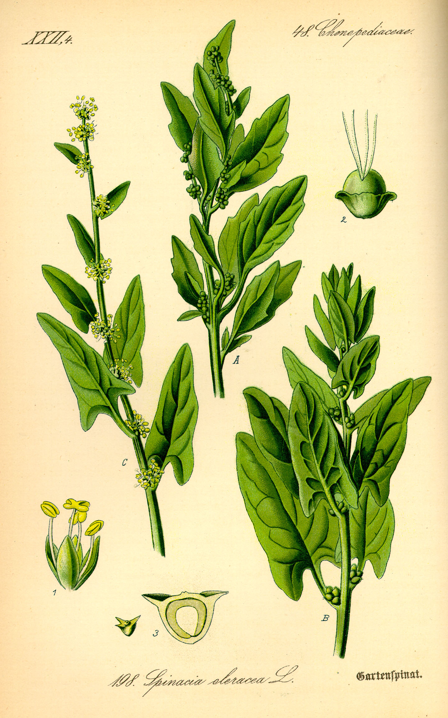 Spinacia oleracea